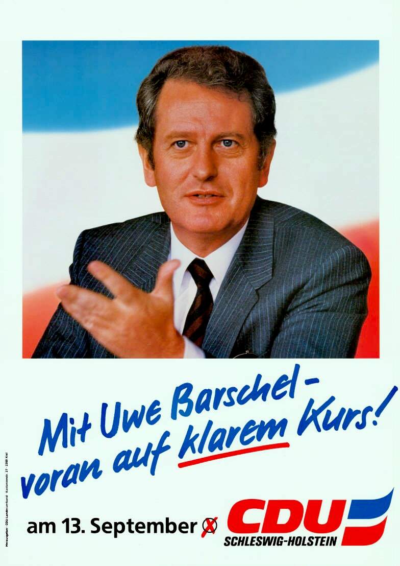 Mit Uwe Barschel - voran auf klarem Kurs! am 13. September X CDU Schleswig-HolsteinAbbildung:Porträtfoto - Landesfarben - StimmkreuzPlakatart:Kandidaten-/Personenplakat mit PorträtAuftraggeber:CDU-Landesverband, KielObjekt-Signatur:10-012 : 600Bestand:Landtagswahlplakate Schleswig-Holstein (10-012)GliederungBestand10-18:Landtagswahlplakate Schleswig-Holstein (10-012) » CDULizenz:KAS/ACDP 10-012 : 600 CC-BY-SA 3.0 DE